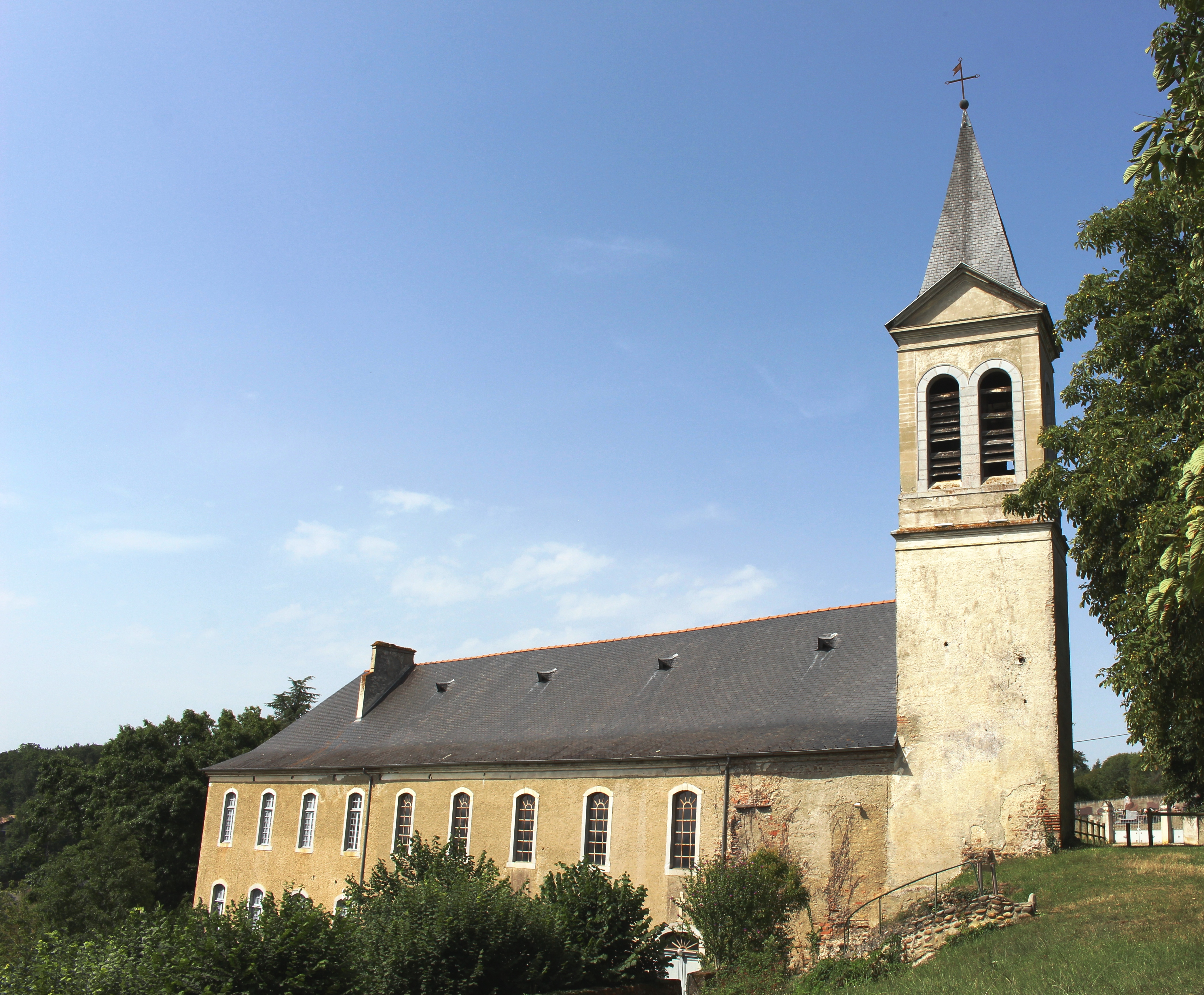 Église Saint-Lizier de Saint-Lézer (Hautes-Pyrénées, France)